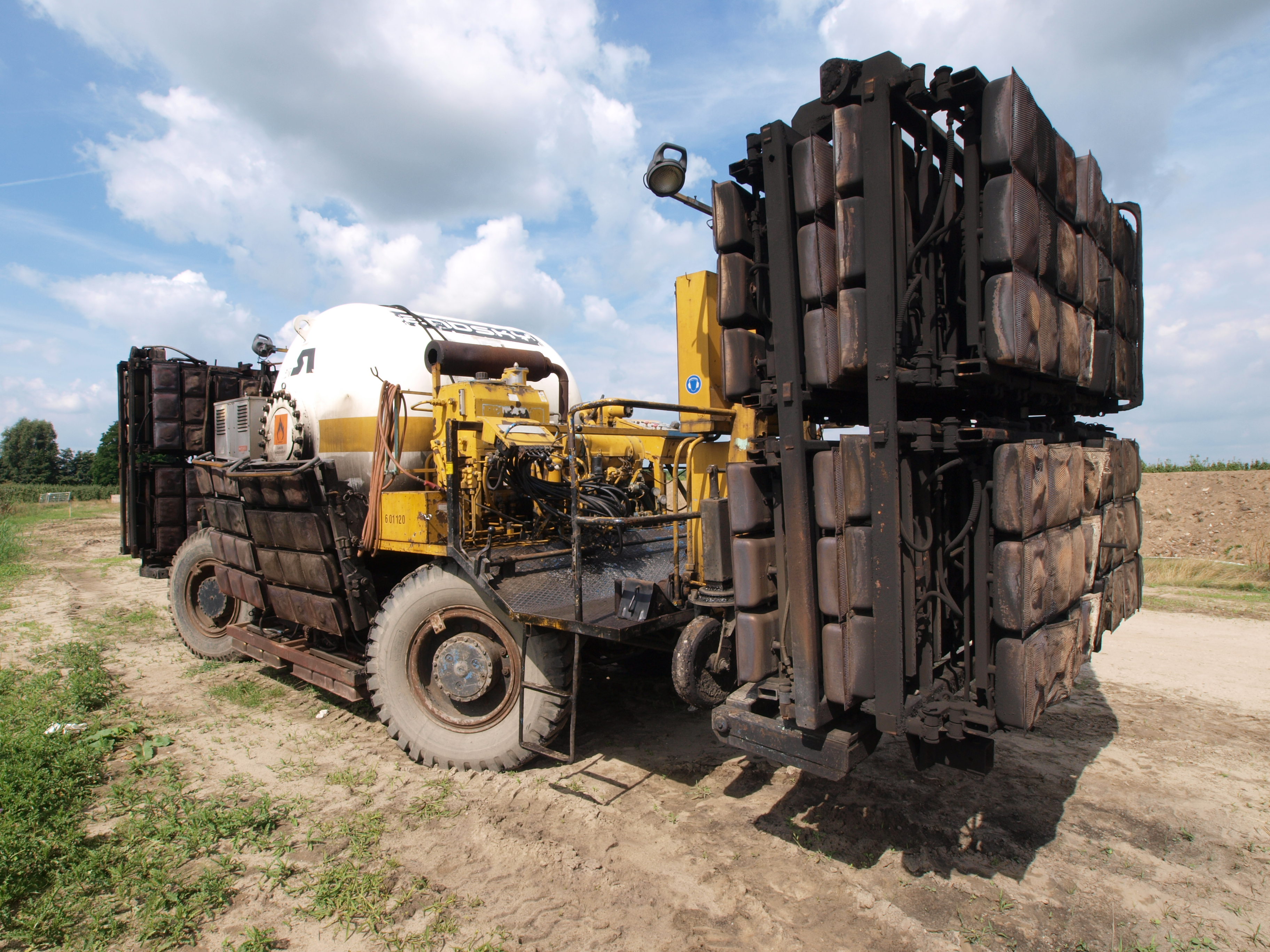 Wirtgen Mitchell Panel heating machine